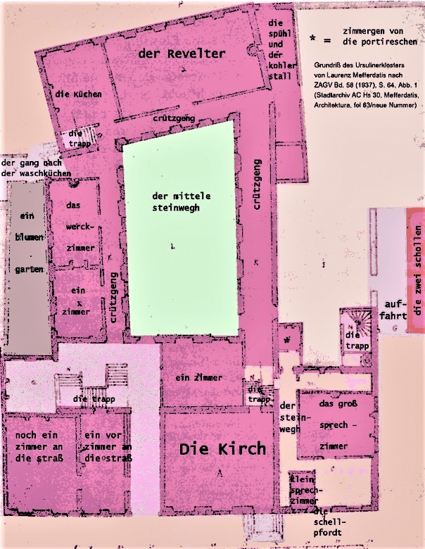 Grundriss des alten Ursulinenklosters in Aachen nach einem Originalplan von Laurenz Mefferdatis im Stadtarchiv Aachen